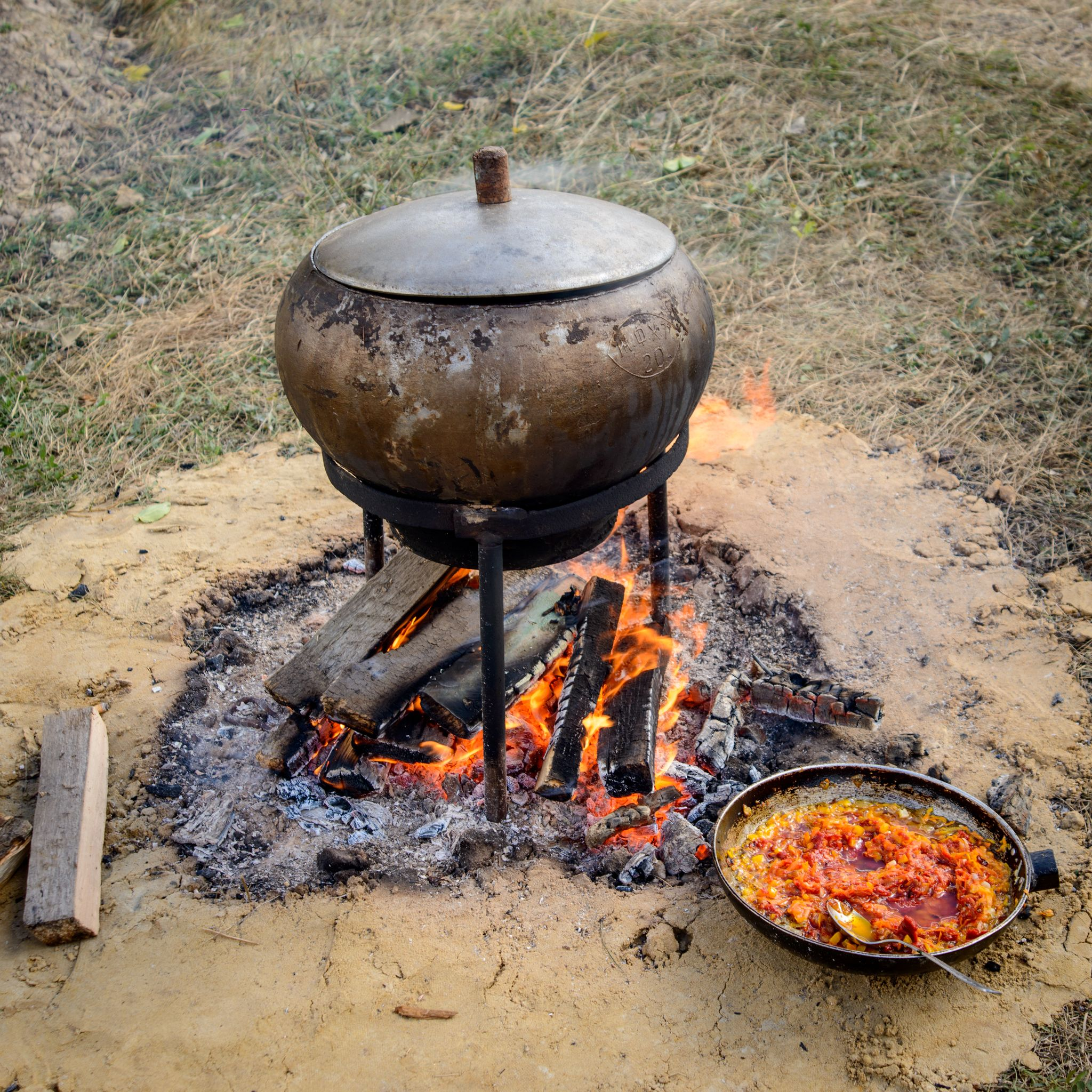 Польові умови приготування борщу під час етнографічного фестивалю «Свіччине весілля» у 2016 році в Березовій Рудці Знято під час Вело-вікі-експедиція селами Гребінківського та Пирятинського районів